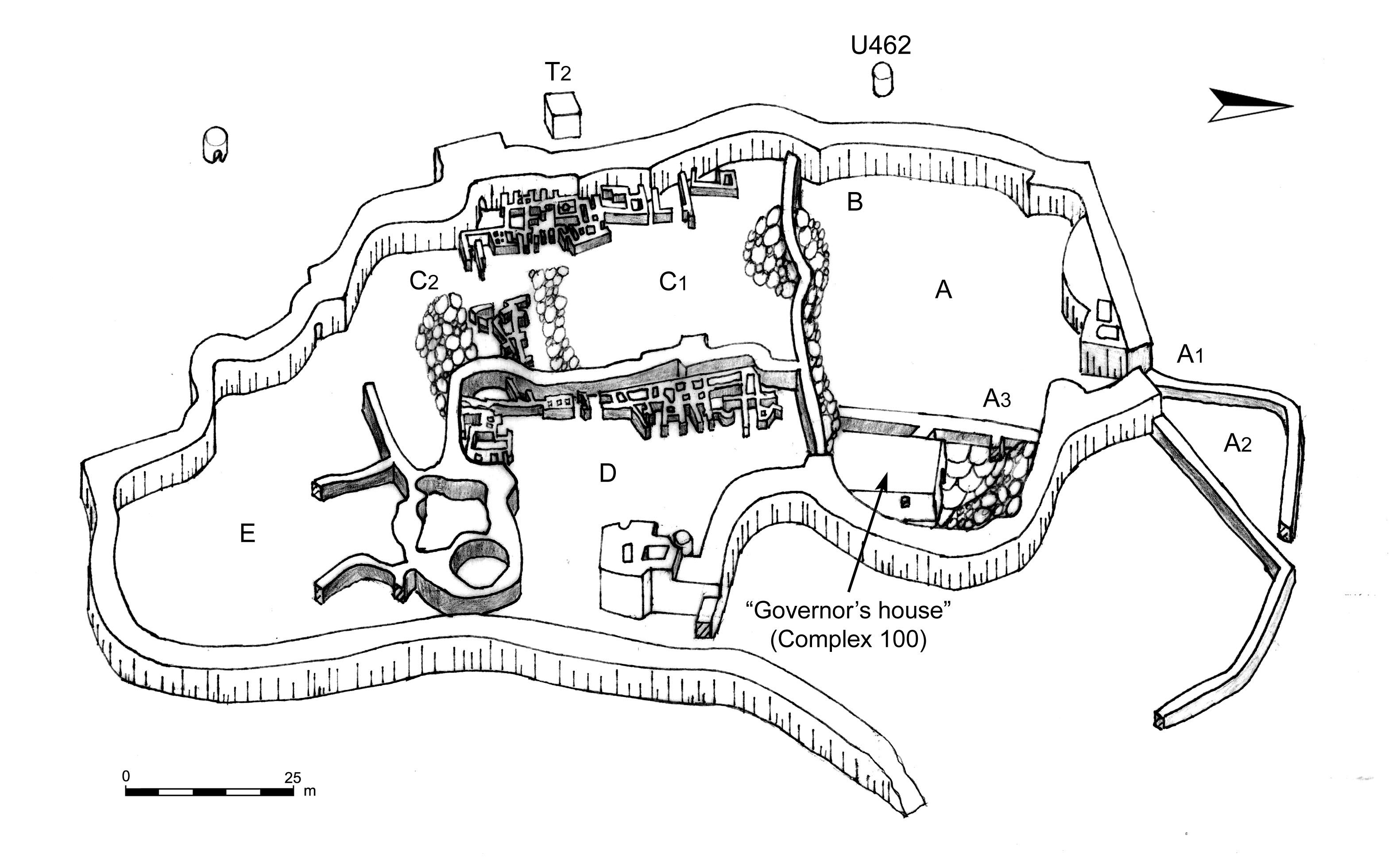 אל-אחוואט הוא אתר ארכאולוגי מתקופת הברזל הממוקם בשומרון ליד היישוב קציר שחזור האתר המבוצר באל-אחוואט. שימו לב לחומה הגלית, למיקום "בית המושל" (A3), לשער שנחפר (A1-2) ולחלוקת העיר ל"רובעים" (איור האסנת גדיר)